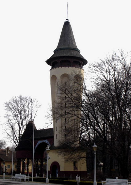 Palić/Palics, Vojvodina, Serbia - Water tower